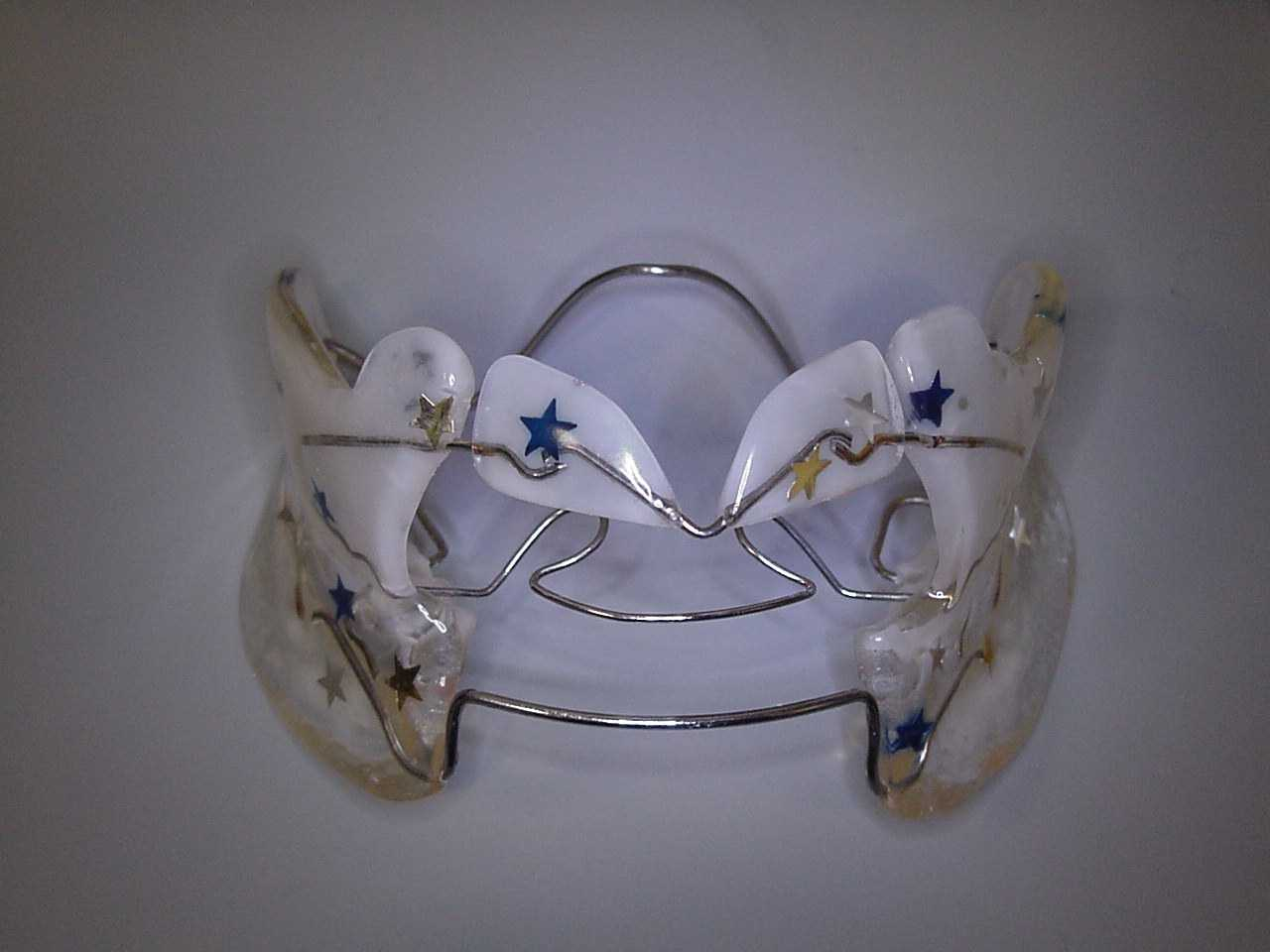 Funktionsregler Typ3